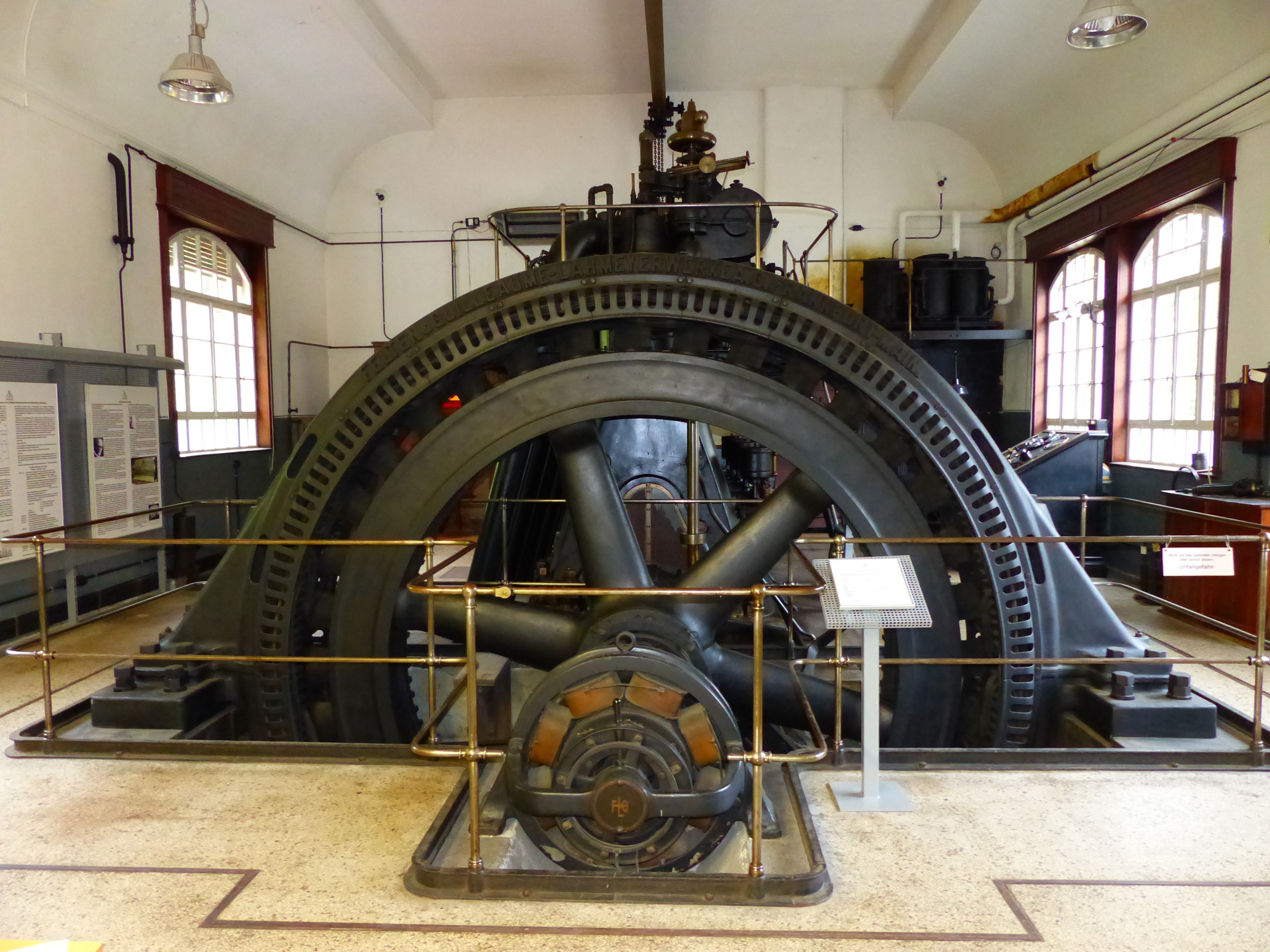 Dieselmuseum im Gewerbepark H.A.U. an der Oberndorferstraße in Schramberg